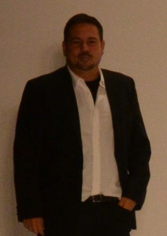 Narciso Rodriguez